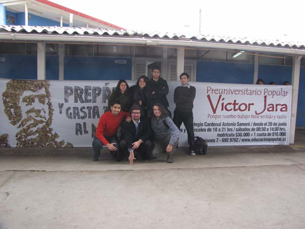 Miembros del Equipo Actividad La Florida 2009